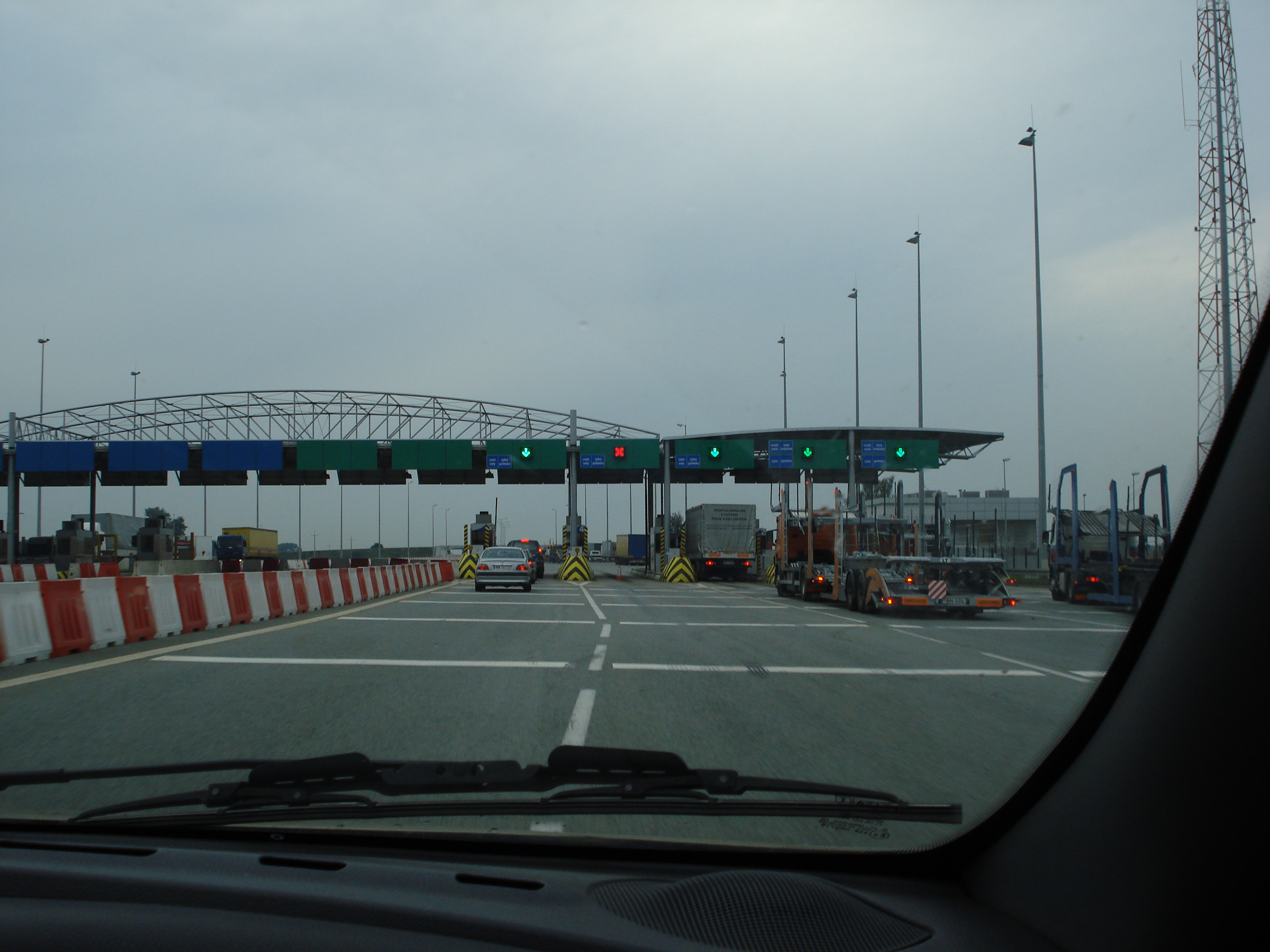 PPO Lądek